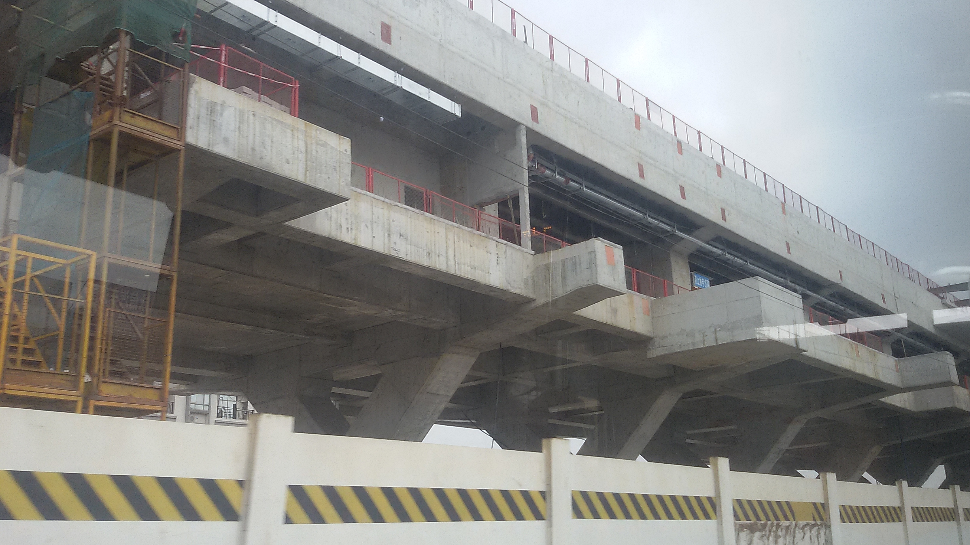 粵語: 2018年2月20號，黎家塘站重喺度起緊。